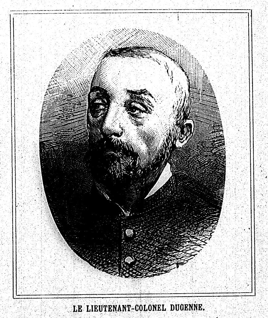 issu des fonds d ela bibliothèque de reims.